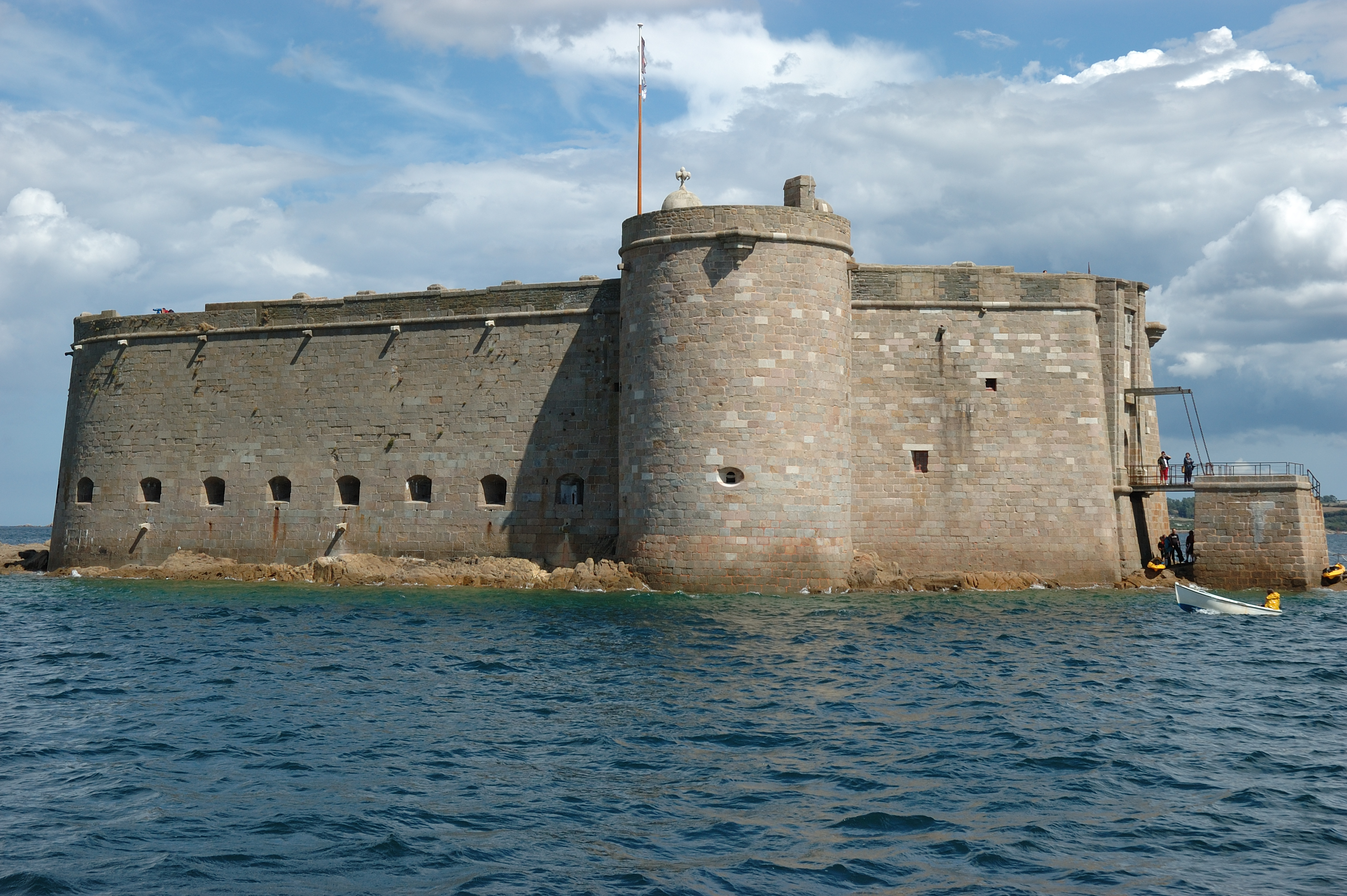 Château du Taureau dans la baie de Morlaix